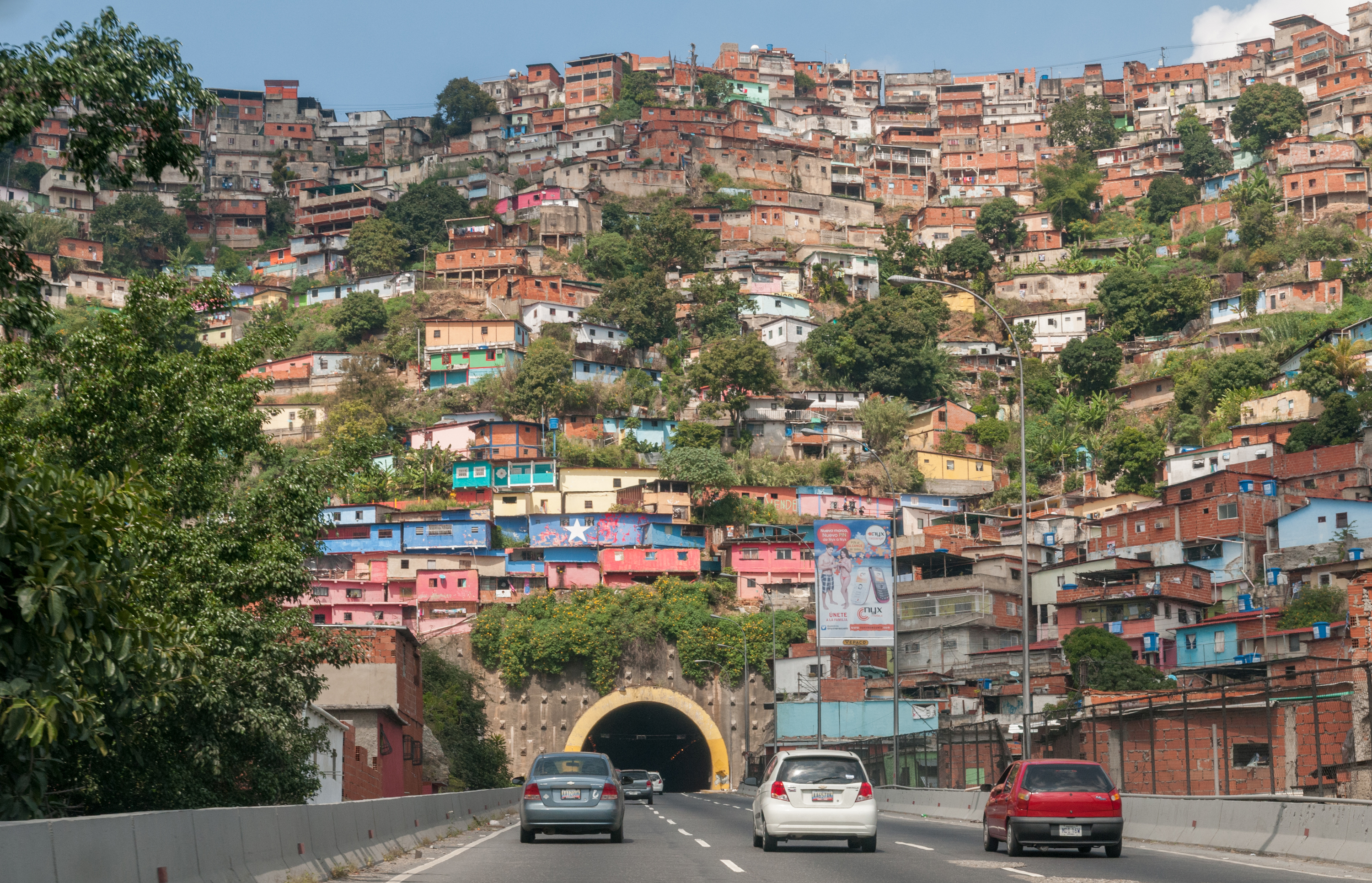 Habitatges improvisats producte de l’èxode dels camperols cap a Caracas.